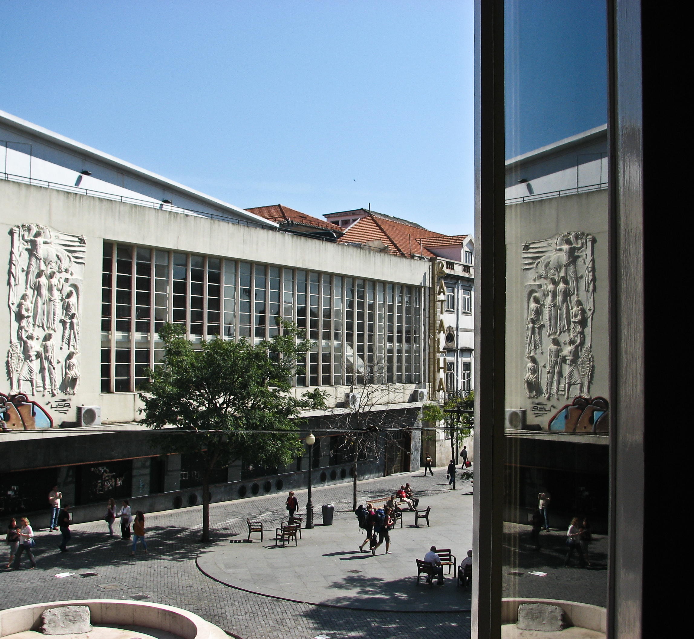 Cinema Batalha This file was uploaded for Wiki Loves Monuments in Portugal with the unique identifier 329677.